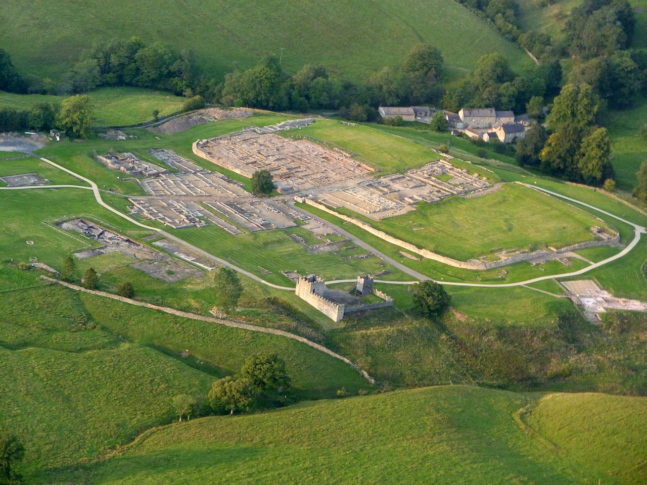 Kastell und Vicus von Vindolanda, Nordengland, Luftbild von 2010